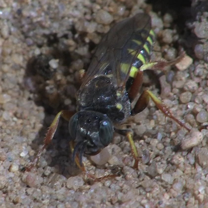 Oxybelus argentatus , Weibchen; gefunden in der Hochspannungstrasse am Frankfurter Flughafen.